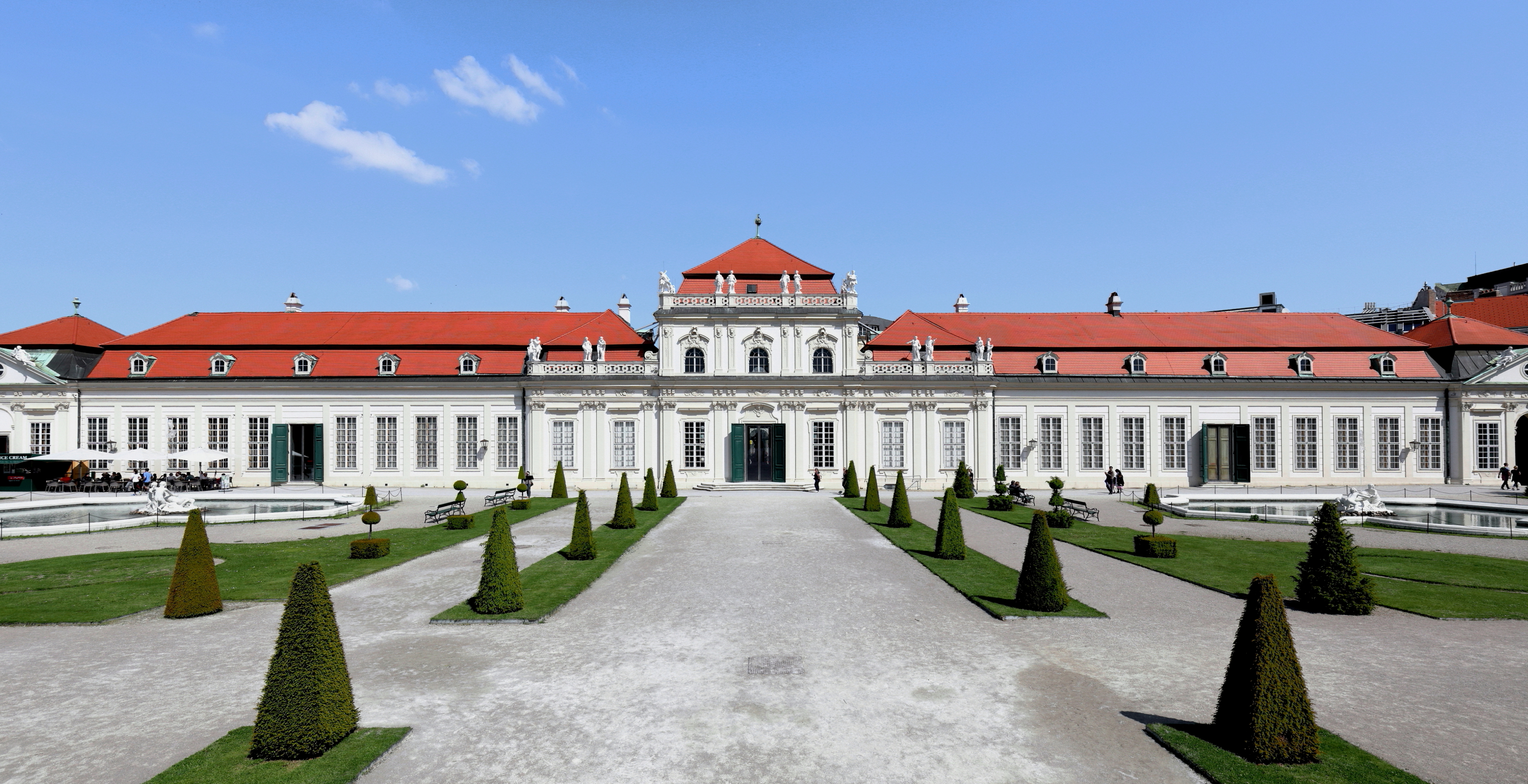 Gartenseitige Ansicht des Unteren Belvederes im 3. Wiener Gemeindebezirk Landstraße.Die barocken Schlossanlage wurde von 1712 bis 1716 von Johann Lukas von Hildebrandt als Sommerwohnsitz für Prinz Eugen von Savoyen erbaut. Im Anschluss wurde bis 1723 das Obere Belvedere errichtet, das ihm als Repräsentations- und Festschloss diente. Aktuell (2017) wird das Untere Belvedere als auch das Obere von der Österreichischen Galerie Belvedere genutzt.